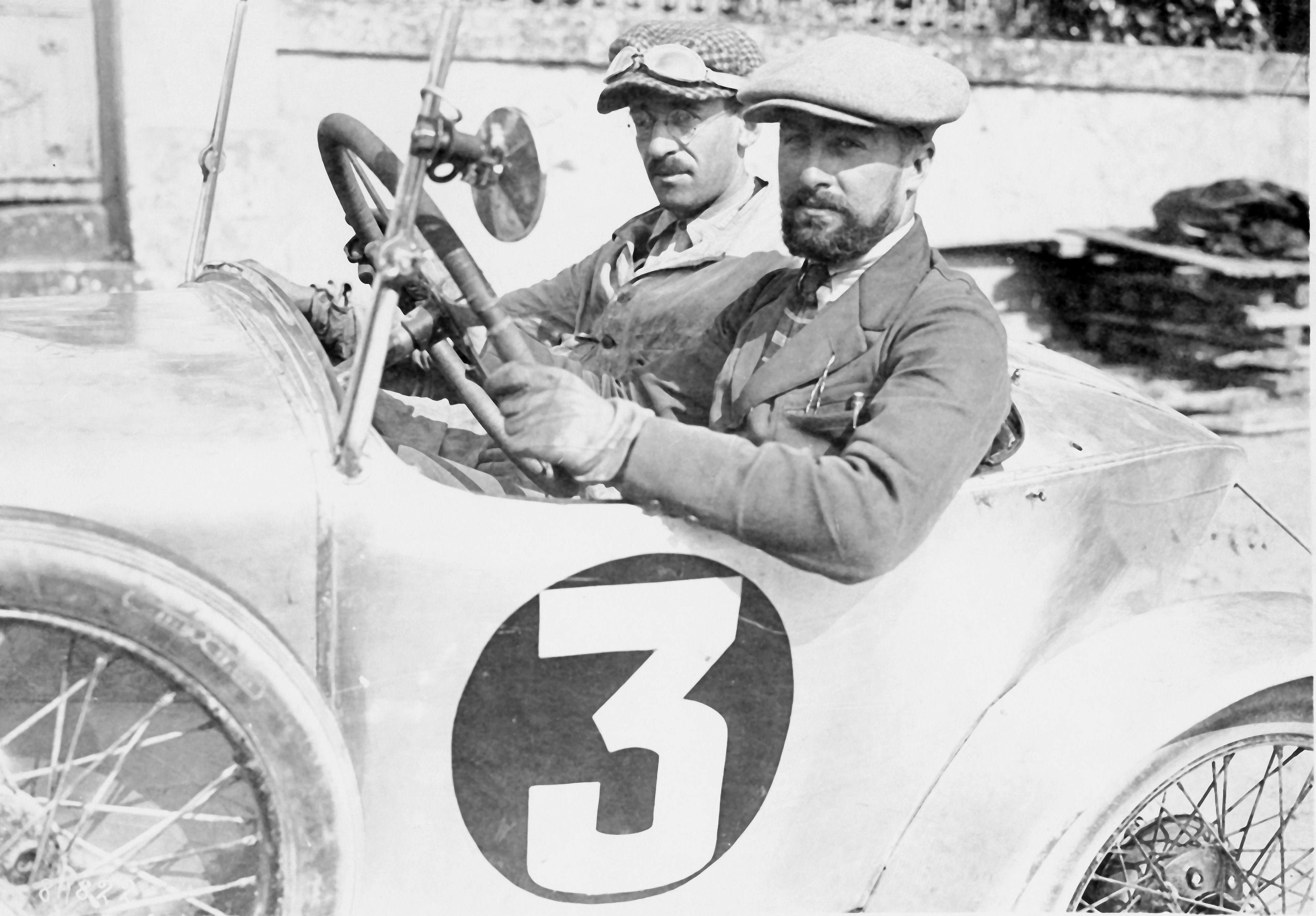 Essaie du Tour de France 1922